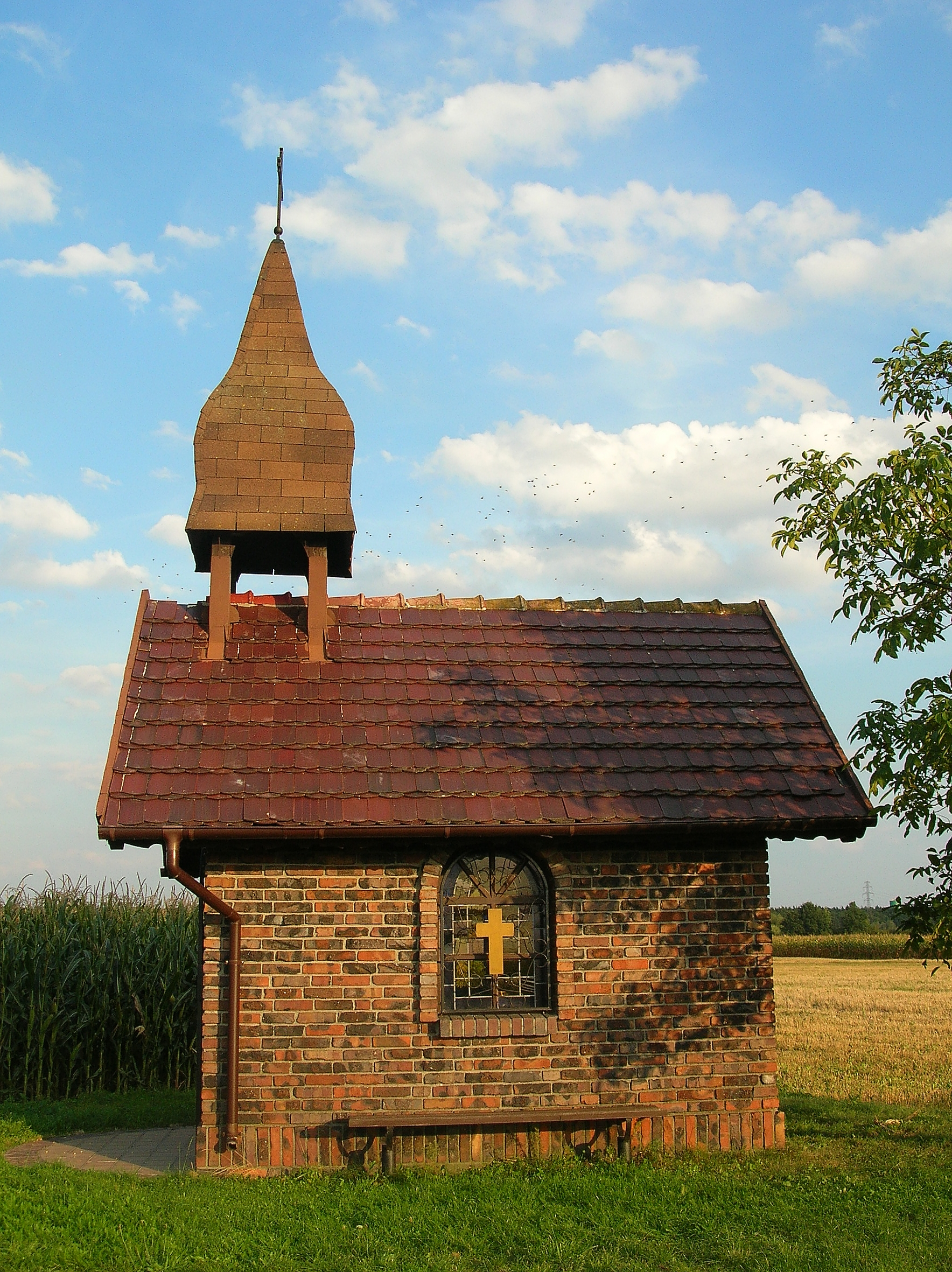 Kaplica św. Michała we wsi Kąty Opolskie.